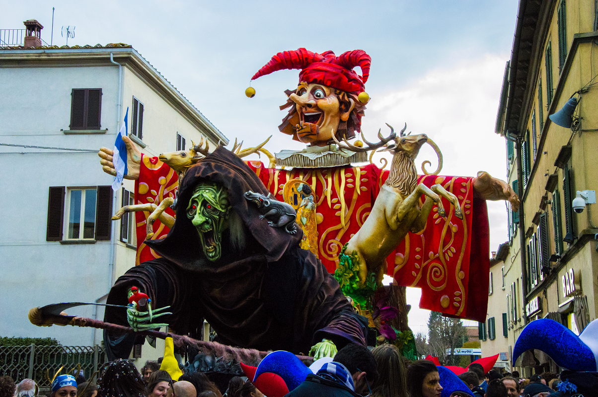 Carro del Cantiere Rustici al Carnevale di Foiano della Chiana 2015